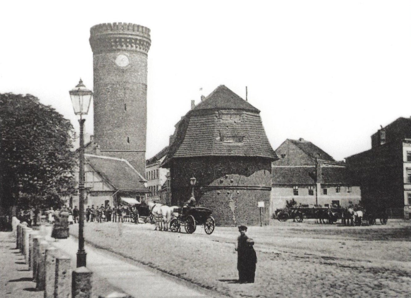 Spremberger Turm in Cottbus